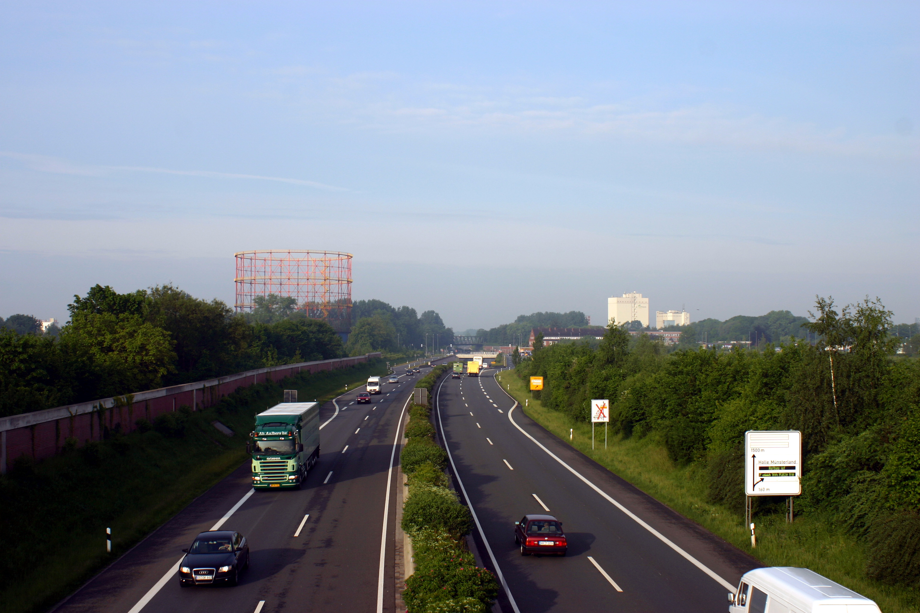 Umgehungsstraße (B51) in Münster